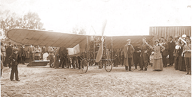 Michał Scipio del Campo - pionier lotnictwa w Polsce, pokaz w Częstochowie 1912